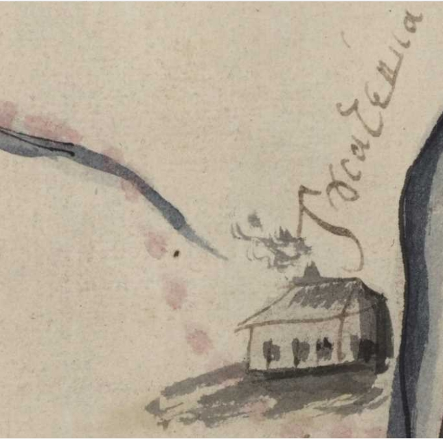 Фрагмент карти Київської губернії. XVIII століття. РГАДА, ф. 192, оп. 1, Киевская губ., № 5.